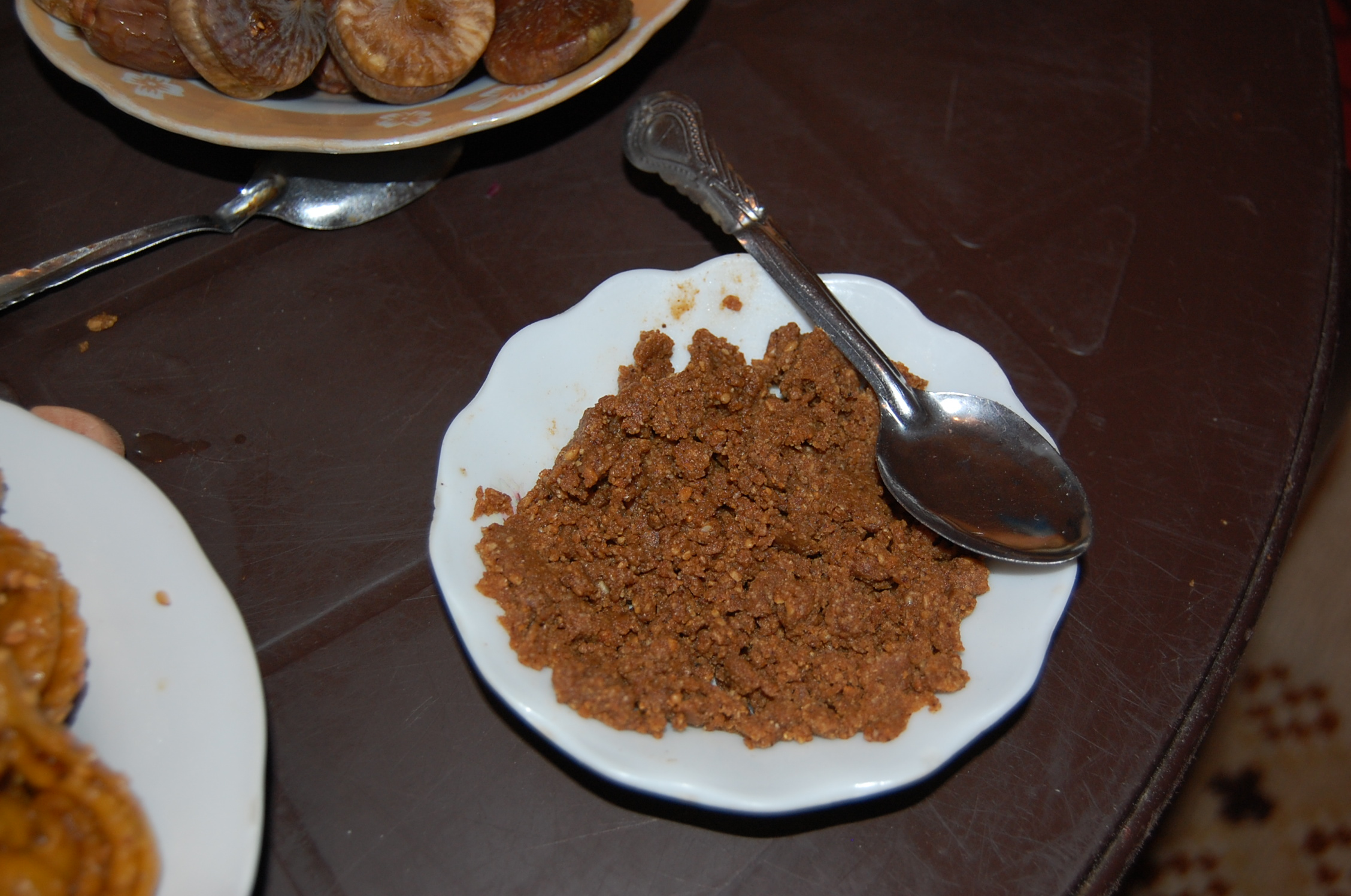 Walon: assîtêye di sellou